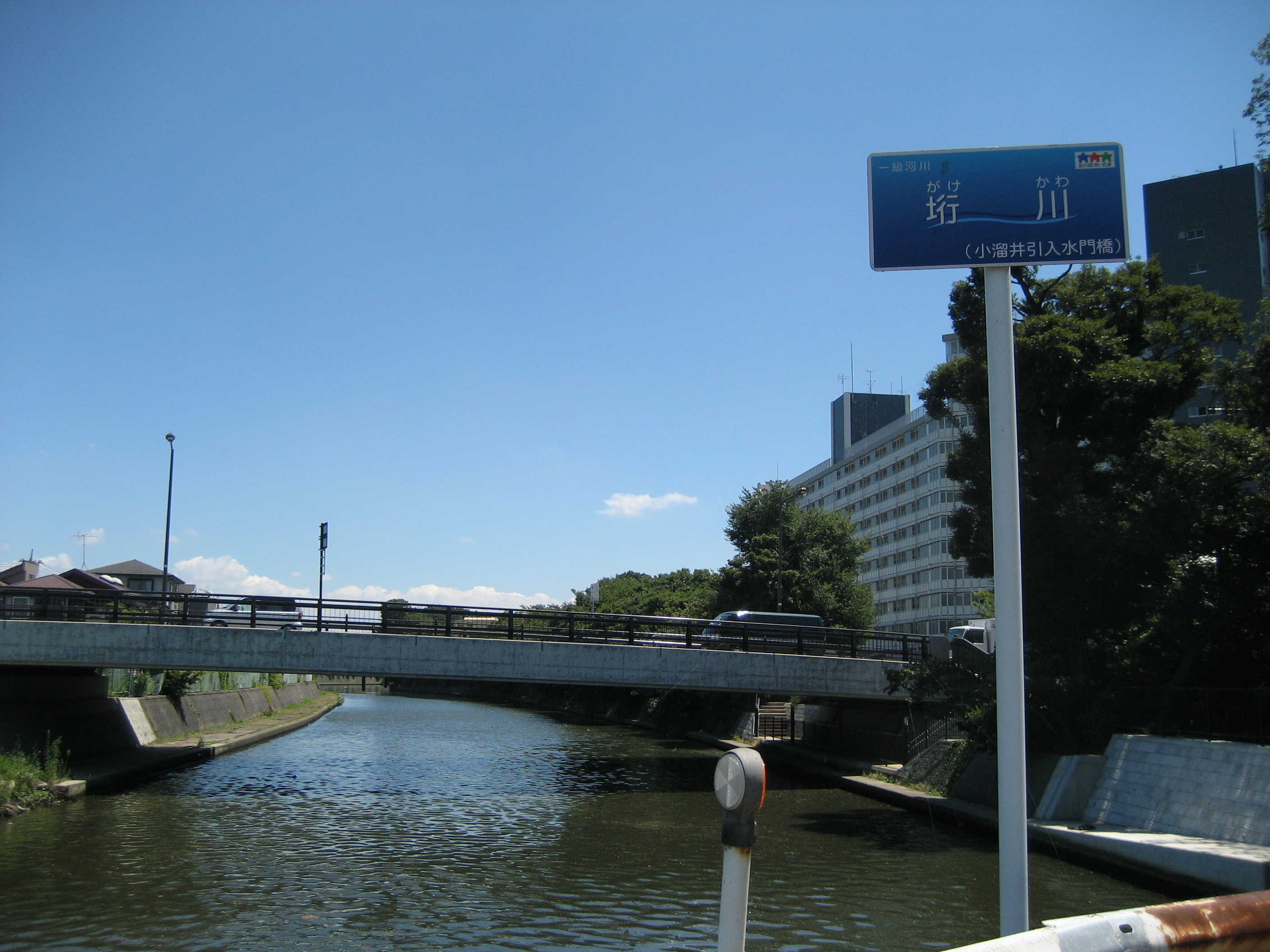 垳川とふれあい桜橋